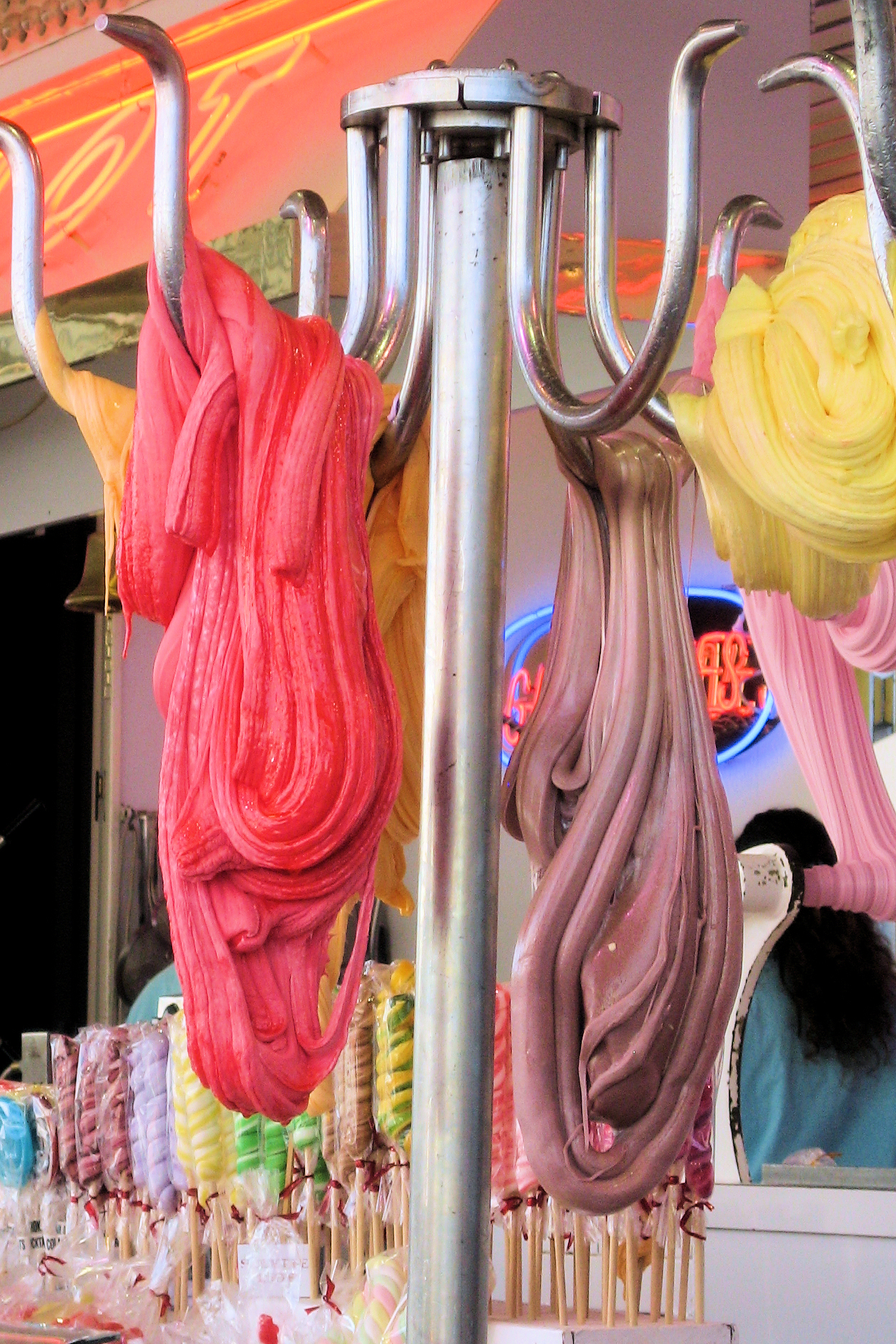 Arbre à guimauve sur une fête foraine à Nantes (France) en septembre 2006.